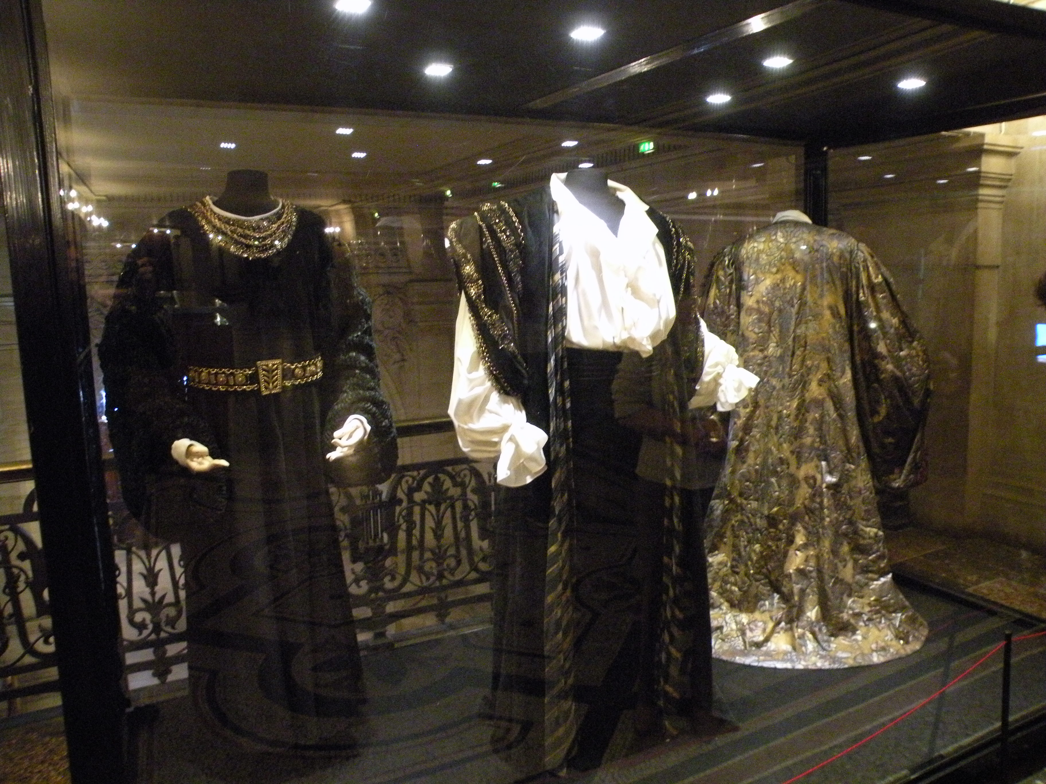 opéra garnier collection de costume